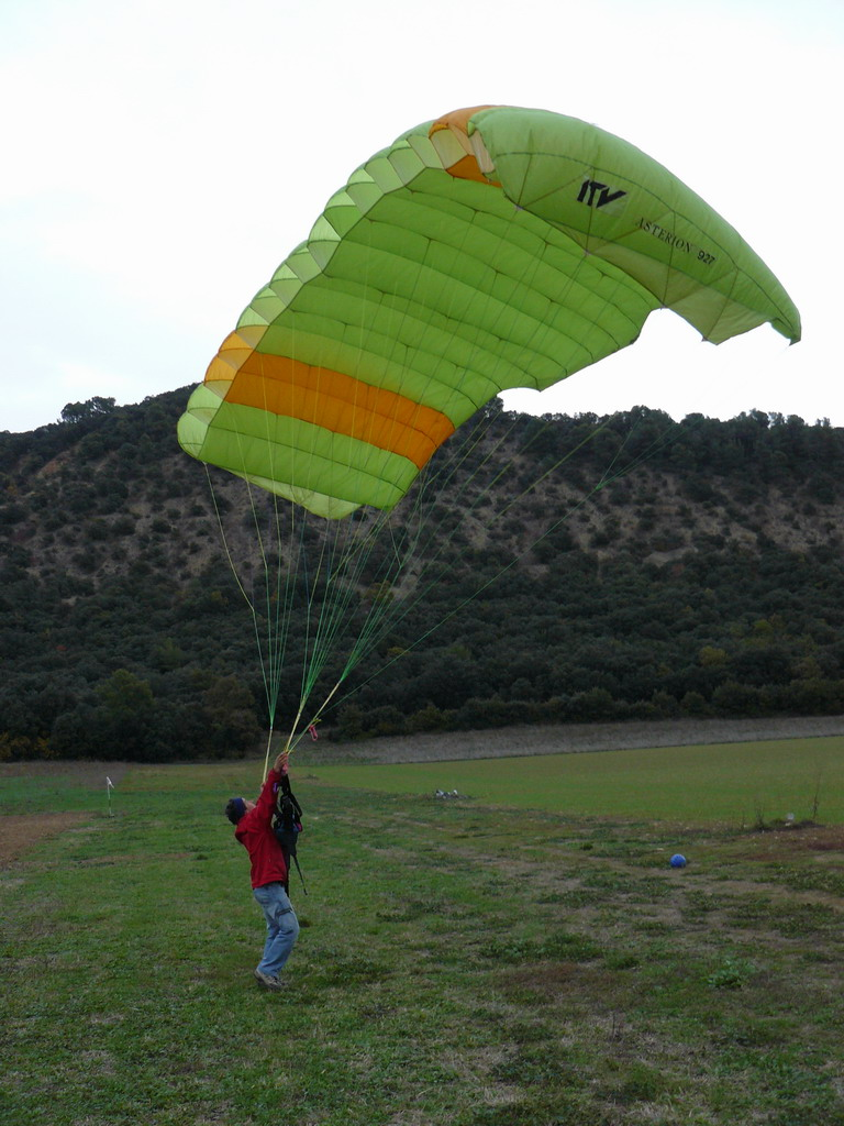 Parapente ancien, ITV Astérion 927 (conception 1986)